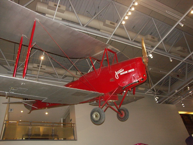 Uno dei primi Tiger Moth convertiti ad uso civile. L'immagine originale proviene da en.wiki:. È stata caricata da in data 00:32, 1 aprile 2006.